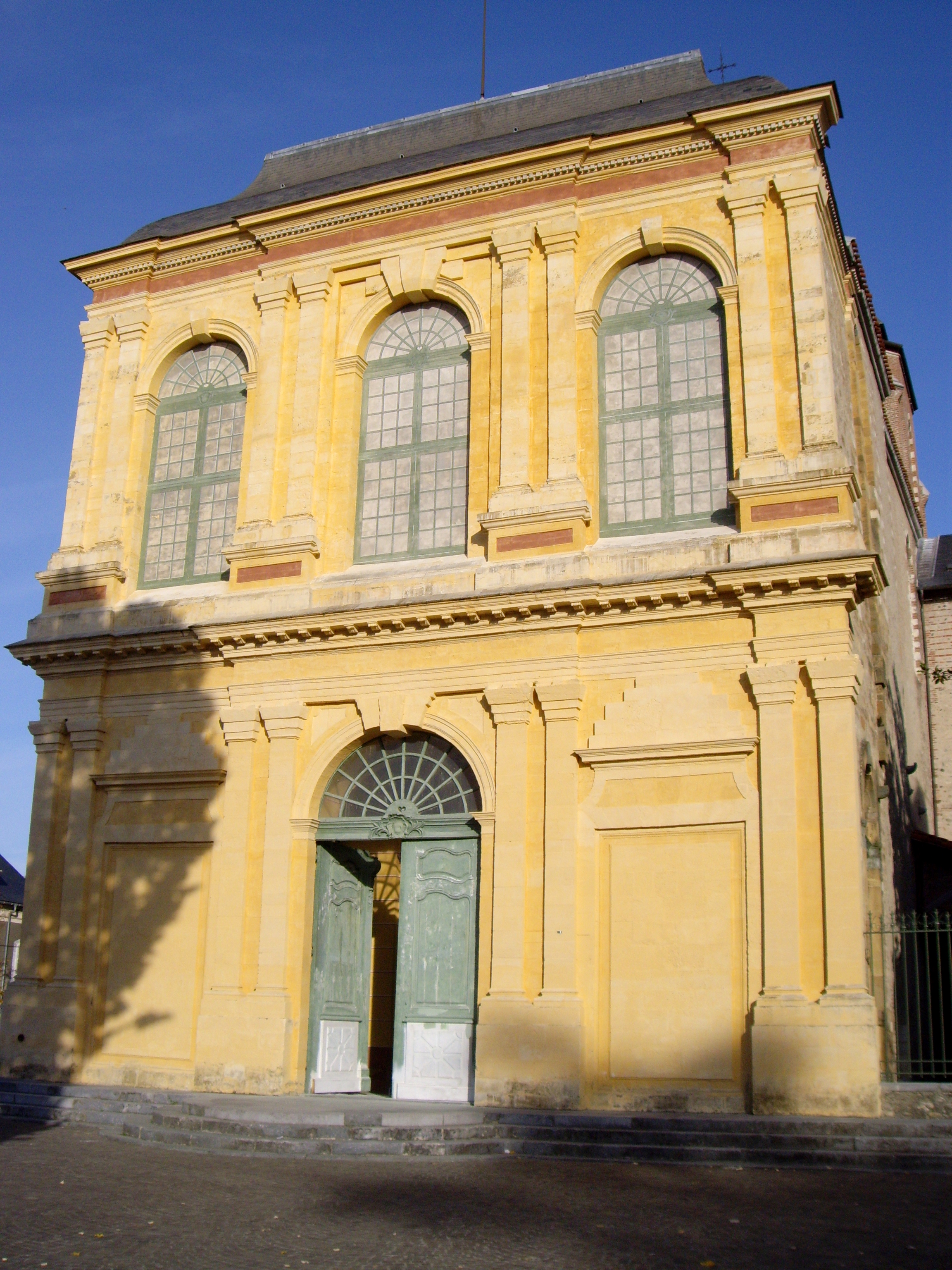 Cathédrale Notre-Dame de la Sède (Tarbes, 65)